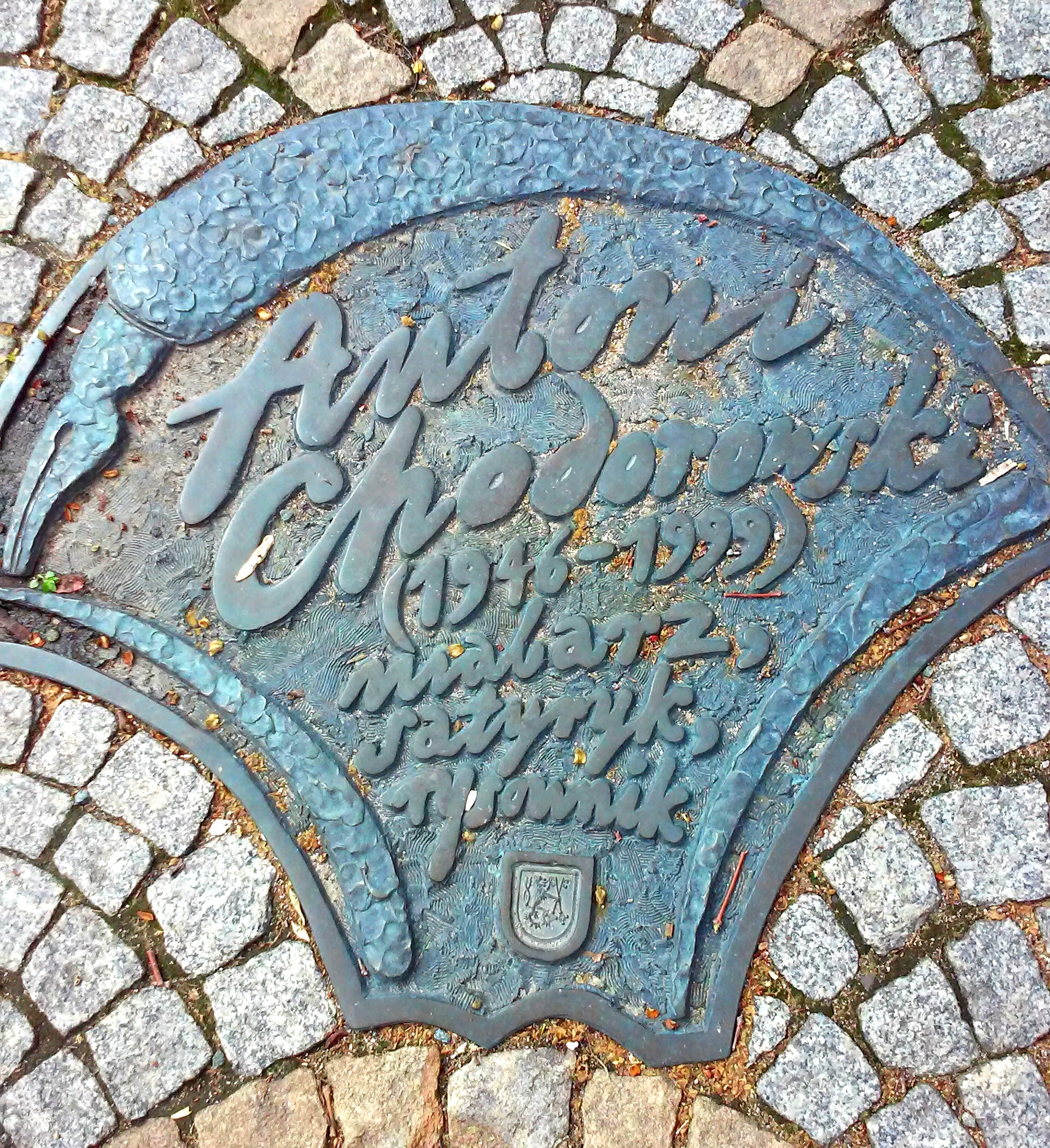 Legnica, Aleja Gwiazd Satyrykonu, tablica pamiątkowa - Antoni Chodorowski.